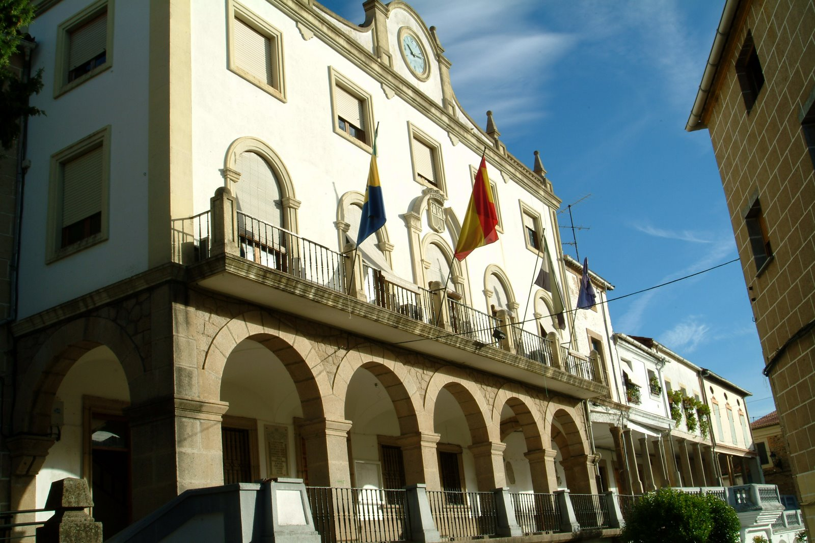 Ayuntamiento, Casa Consistorial de Jaraíz de la Vera (Cáceres, España)